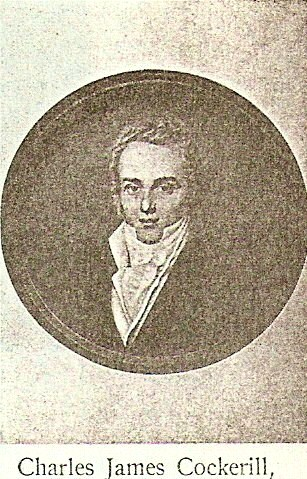 Scan einer in Maccos Buch abgedruckten Ablichtung eines Portraits aus dem Familienbesitz